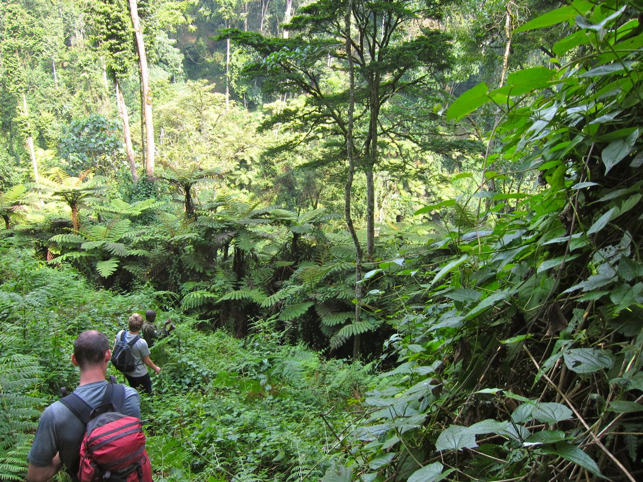 Bwindi Impenetrable NP Uganda